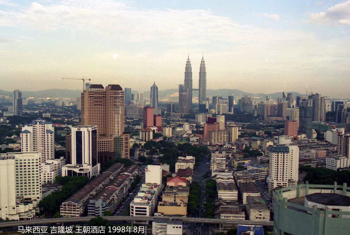 1998年 吉隆坡 王朝酒店顶楼 Dynasty Hotel, Kuala Lumpur